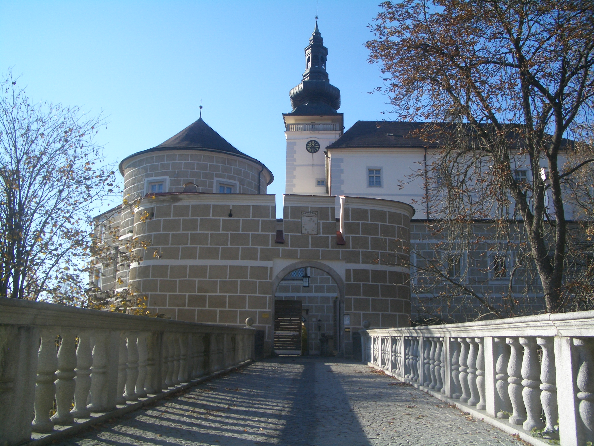 Schloss Weinberg in Kefermarkt, Oberösterreich Object location48° 26′ 55″ N, 14° 32′ 15″ E